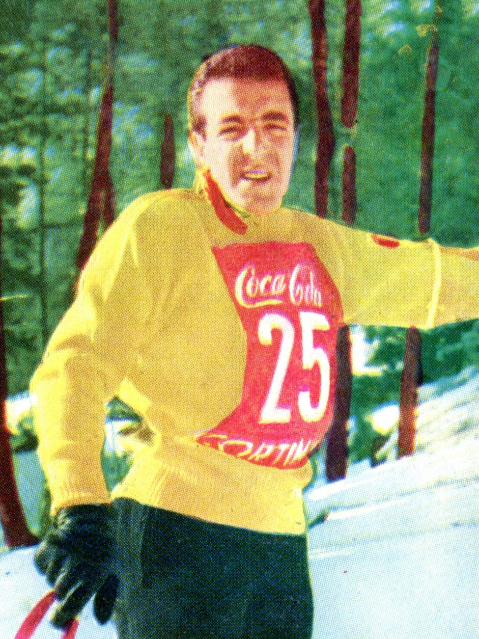 CAMPIONI DELLO SPORT 1966/67 - Figurina/Sticker n. 404 - P. MILIANTI -Rec